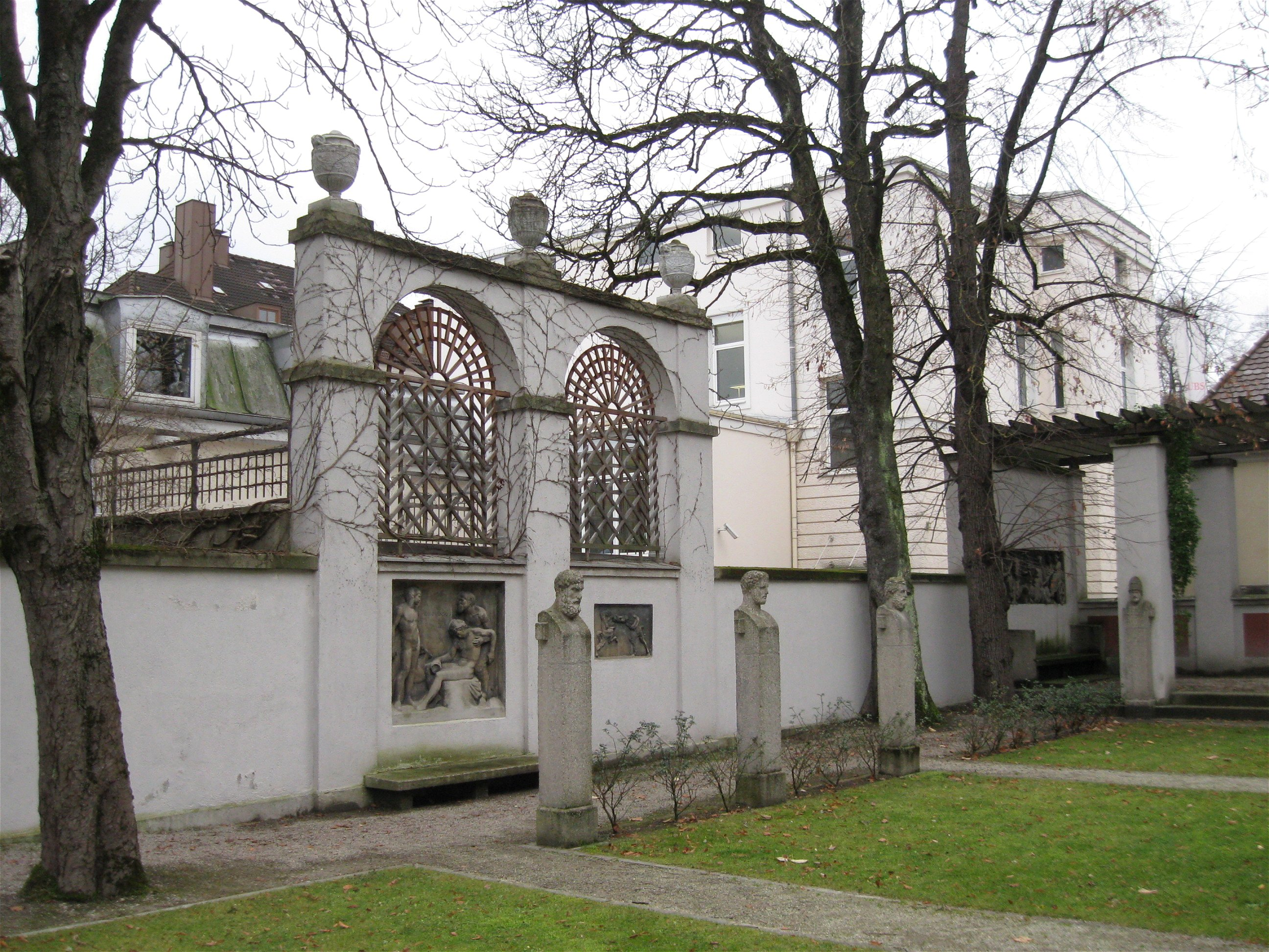 Prinzregentenstraße 60; Villa Stuck, neuklassizistischer Jugendstil, 1897–98 nach Entwurf von Franz von Stuck; mit Innenräumen. Im Garten Pergola und Plastiken.